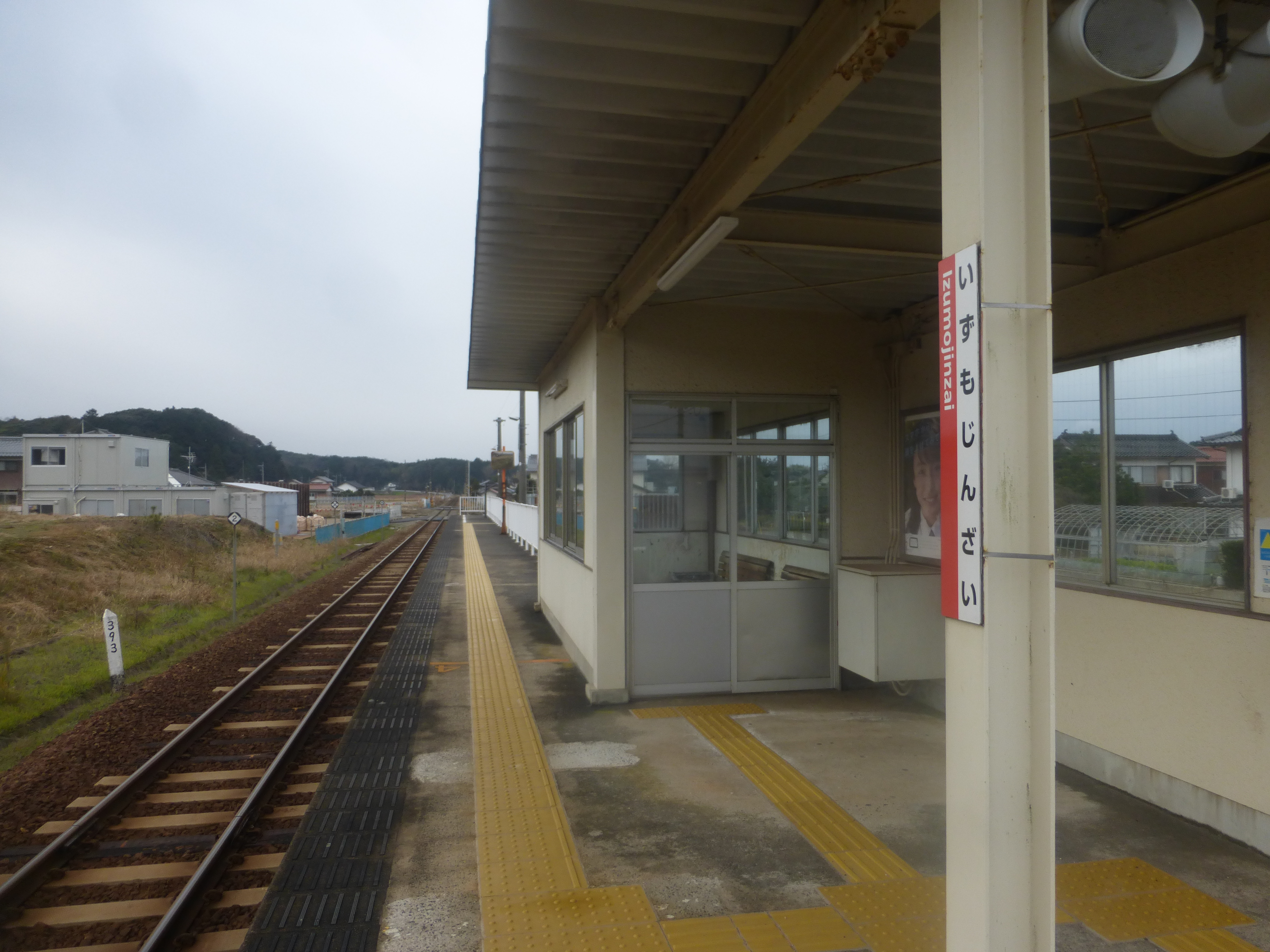 Izumo-Jinzai Station inside (出雲神西駅の中)